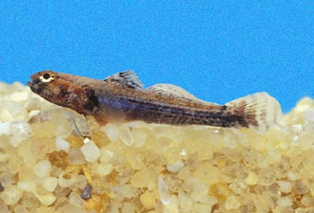 Aboma etheostoma, El Salvador